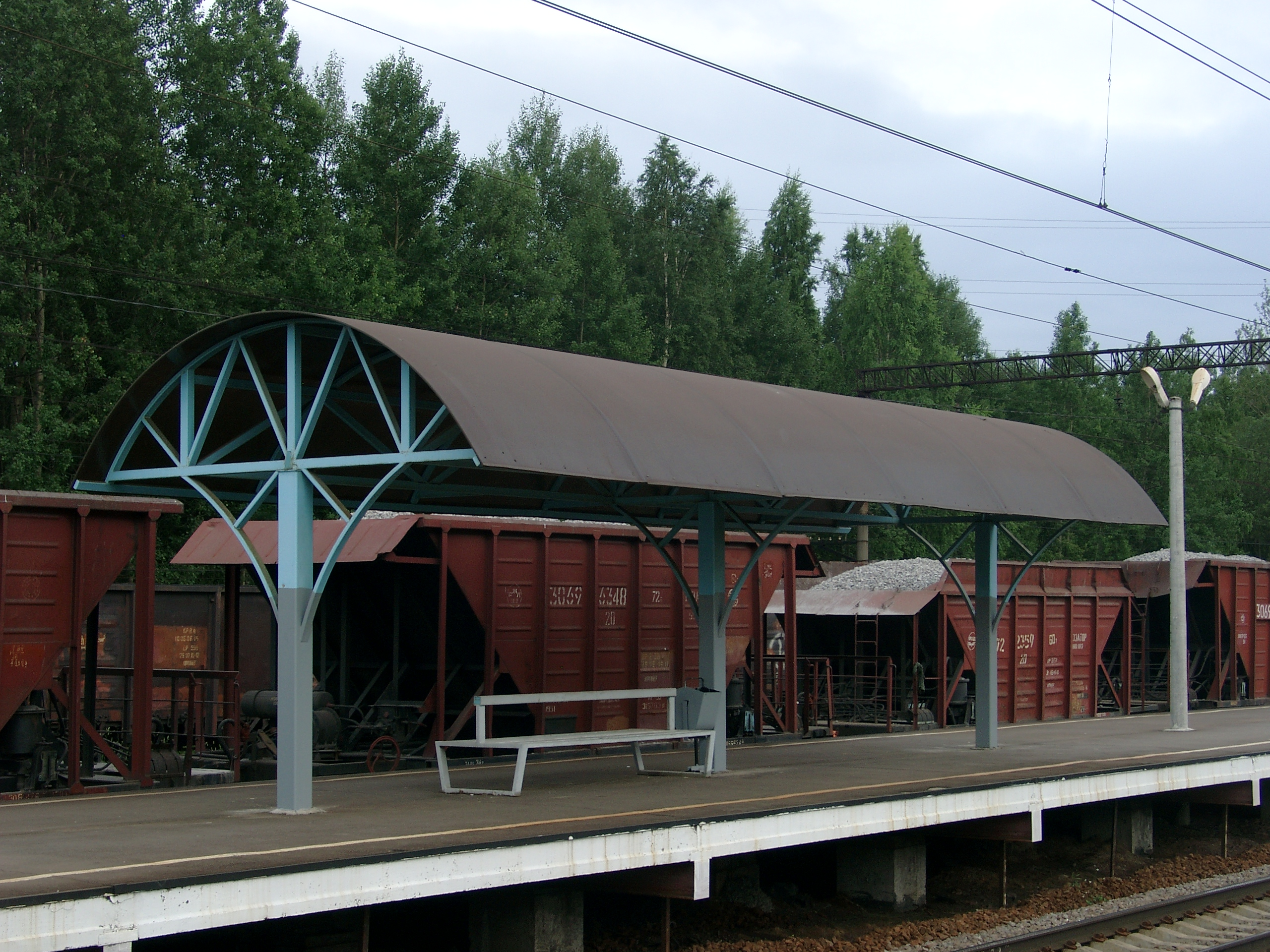 Станция Капитолово, Ленинградская область, Россия. Навес на островной платформе